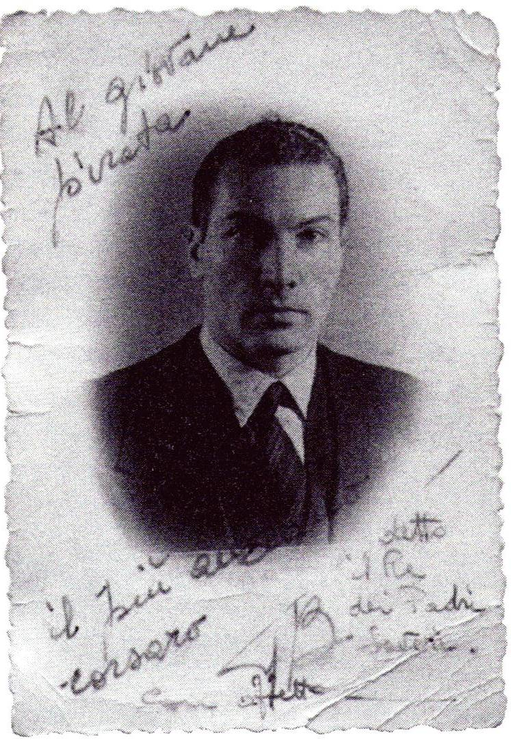 Scrittore, editore e autore di fumetti italiano